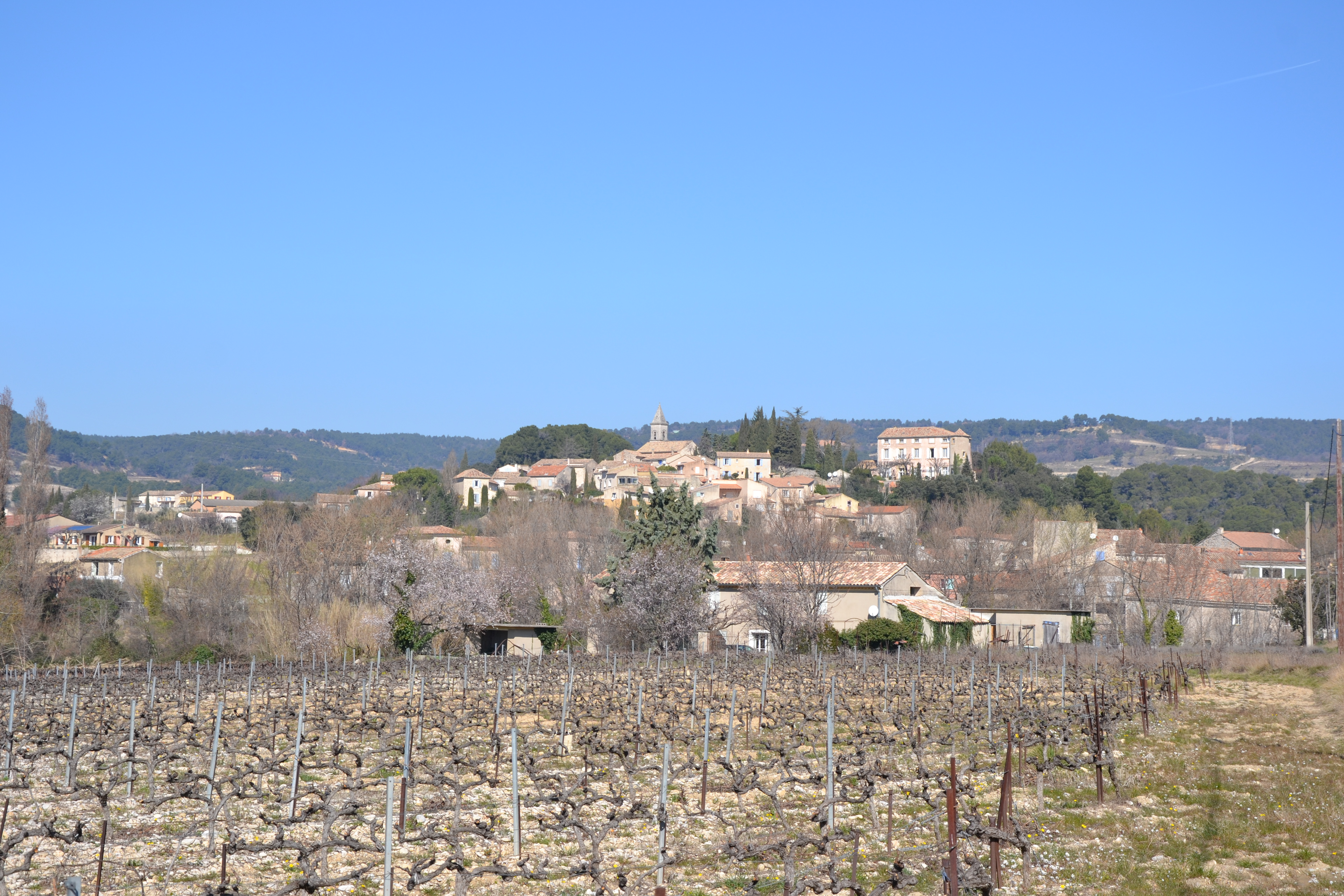 vue générale sur le village de Roaix